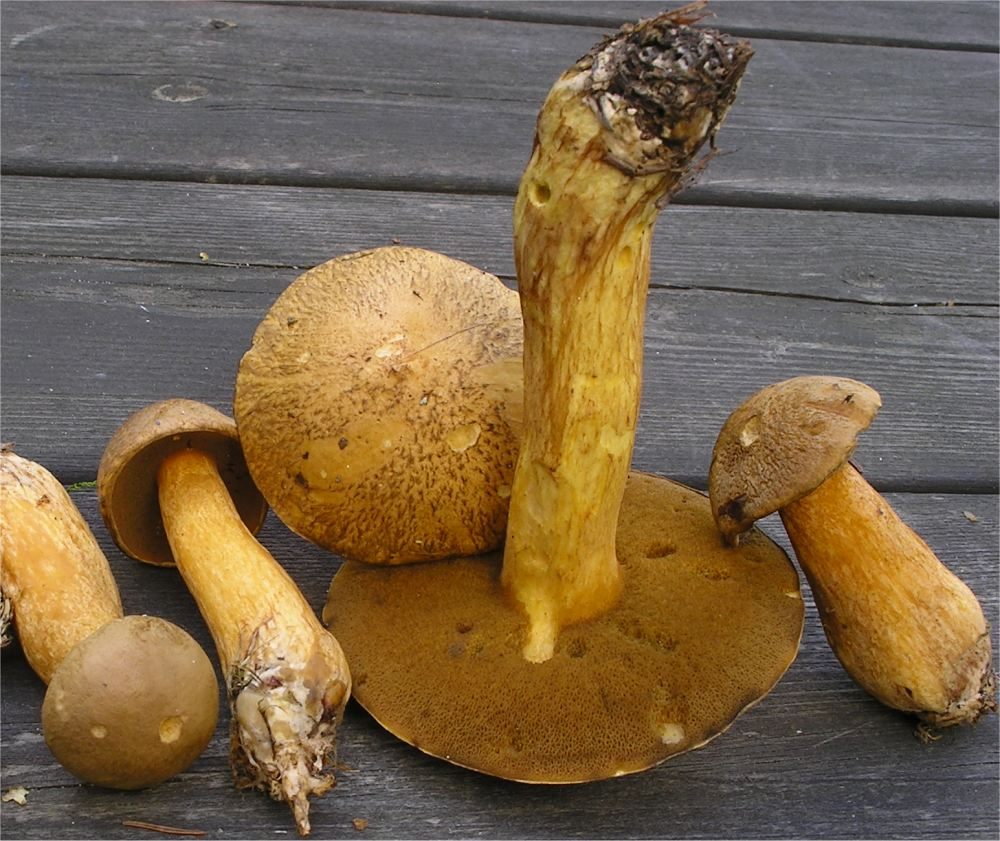 Suillus variegatus (Sw.) Kuntze